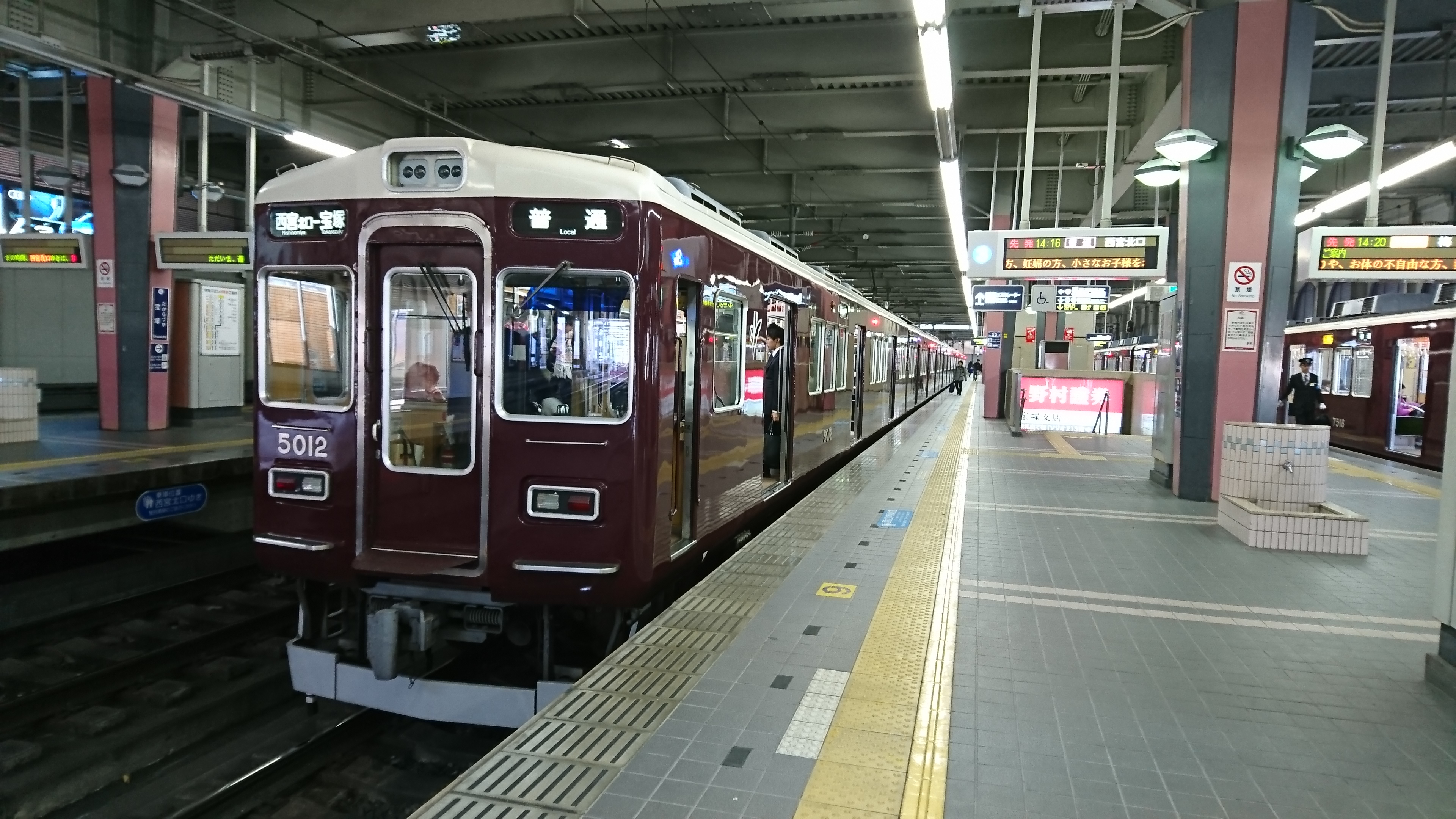 阪急5000系5012F 宝塚駅